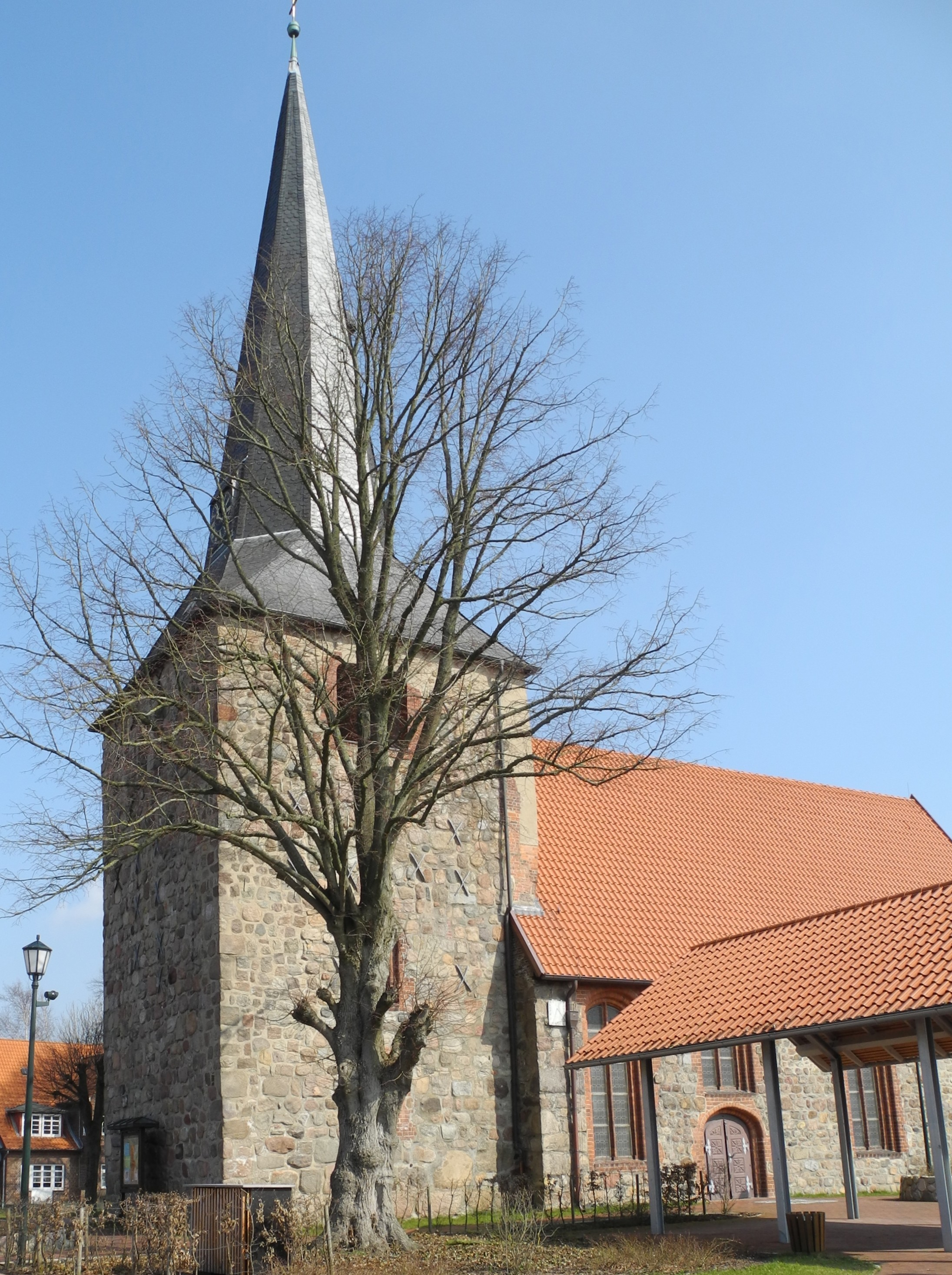 St.-Martins-Kirche Oldendorf (Landkreis Stade), Feldsteinkirche, 800 Jahre